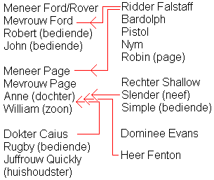 De relaties in The merry Wives of Windsor, vrij gebruik, eigen werk.